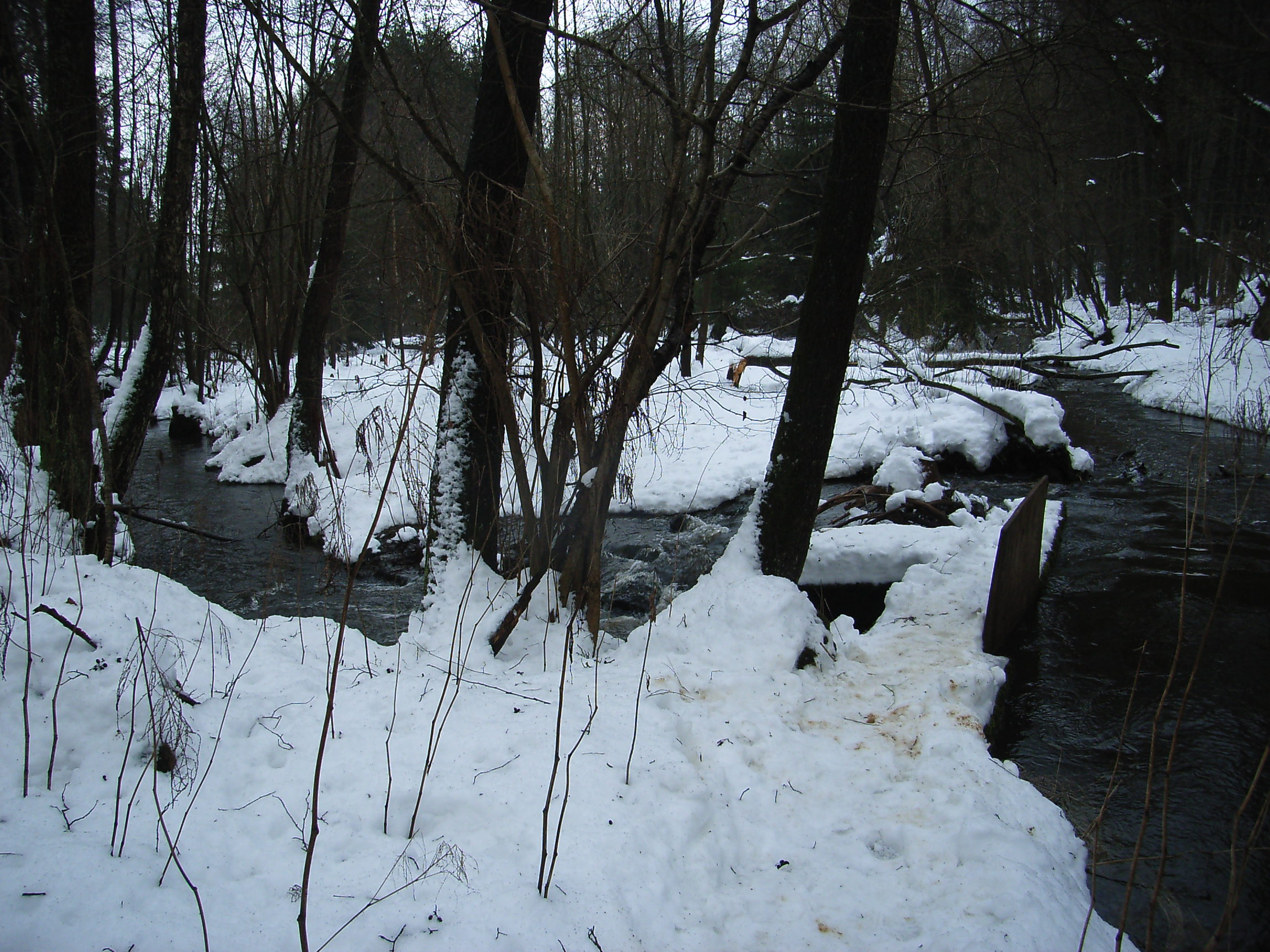 Hüttenbach unterhalb der Hüttensäge